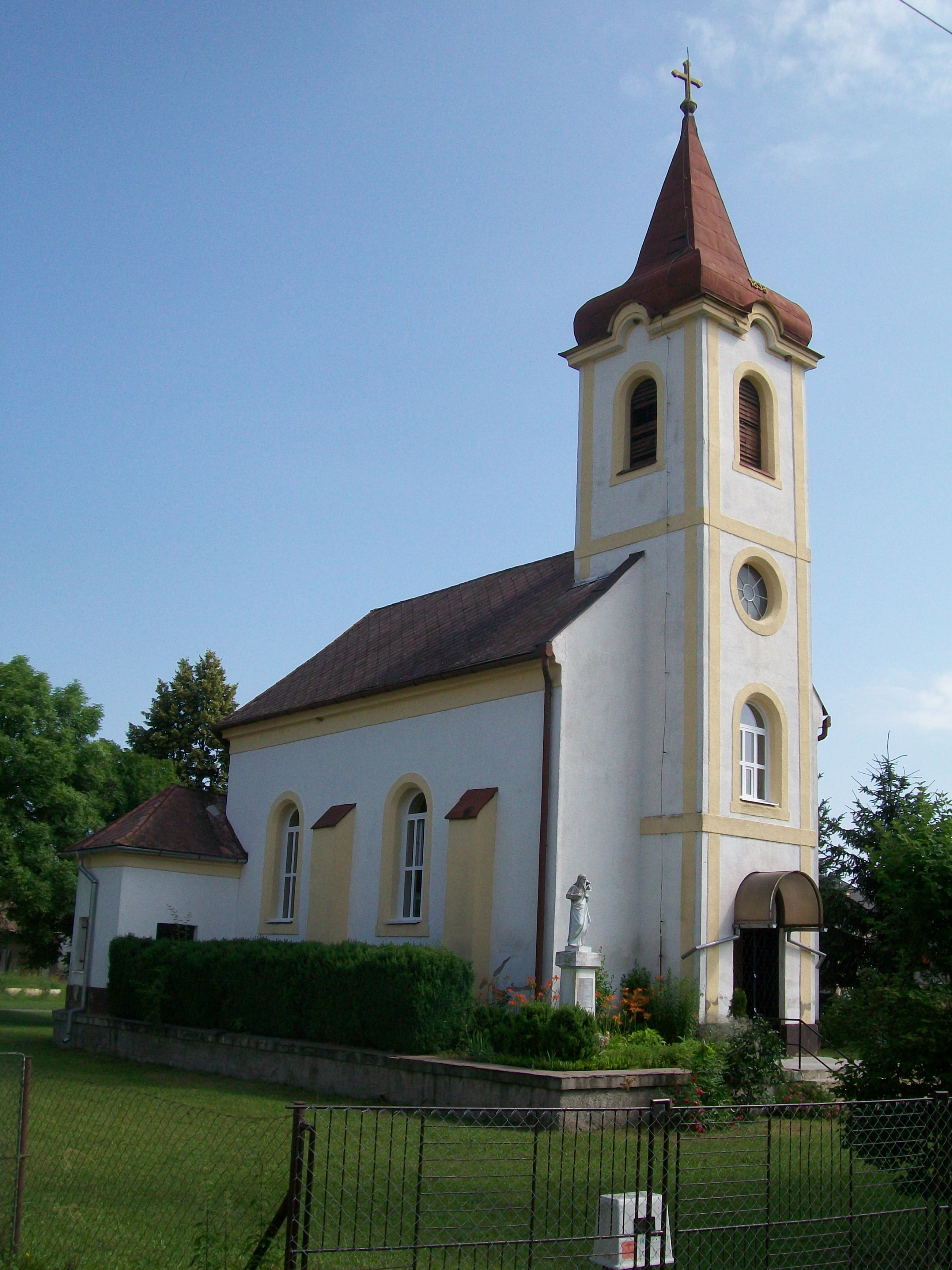 Secesný rím. kat. kostol sv. Ladislava z r. 1898